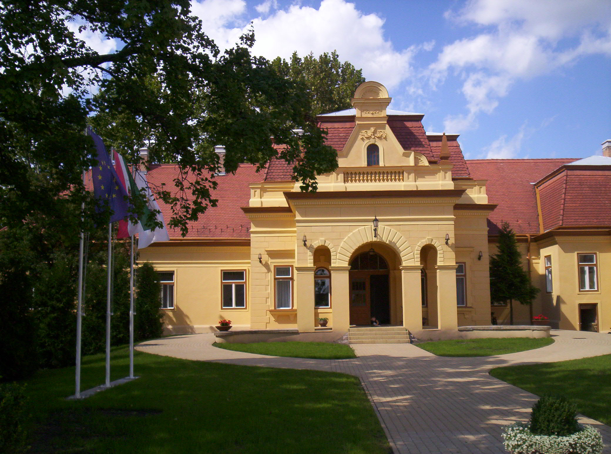 A szentlőrinci Esterházy-kastély – photo taken by uploader User:Csanády in 2006.